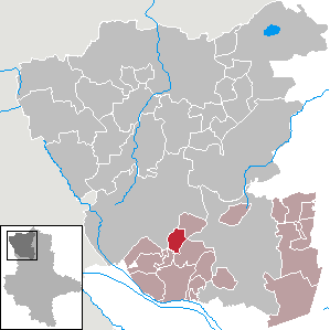 (Original text: Jeggau im Altmarkkreis Salzwedel)